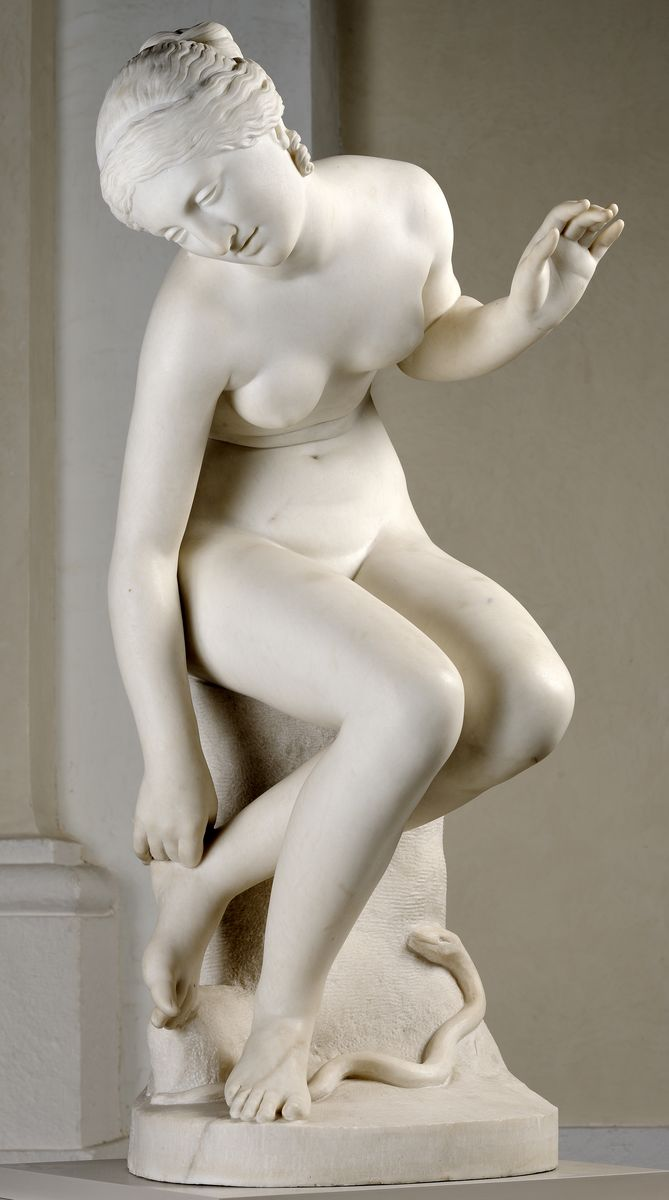 Eurydice